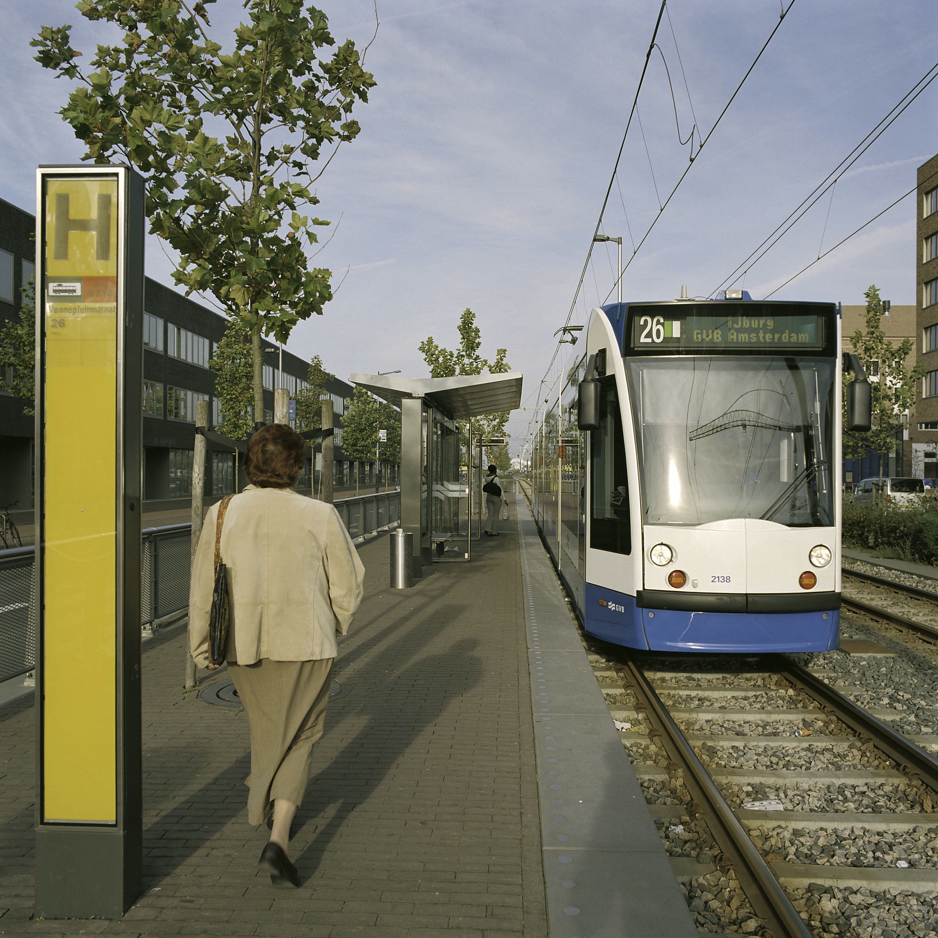 IJburgtram: Tramhalte langs het traject IJburg